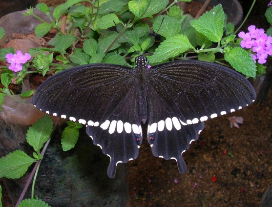 Common Mormon Papilio polytes adult